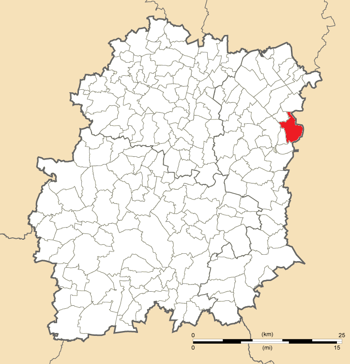 Carte de position de Saint-Pierre-du-Perray en Essonne (91)